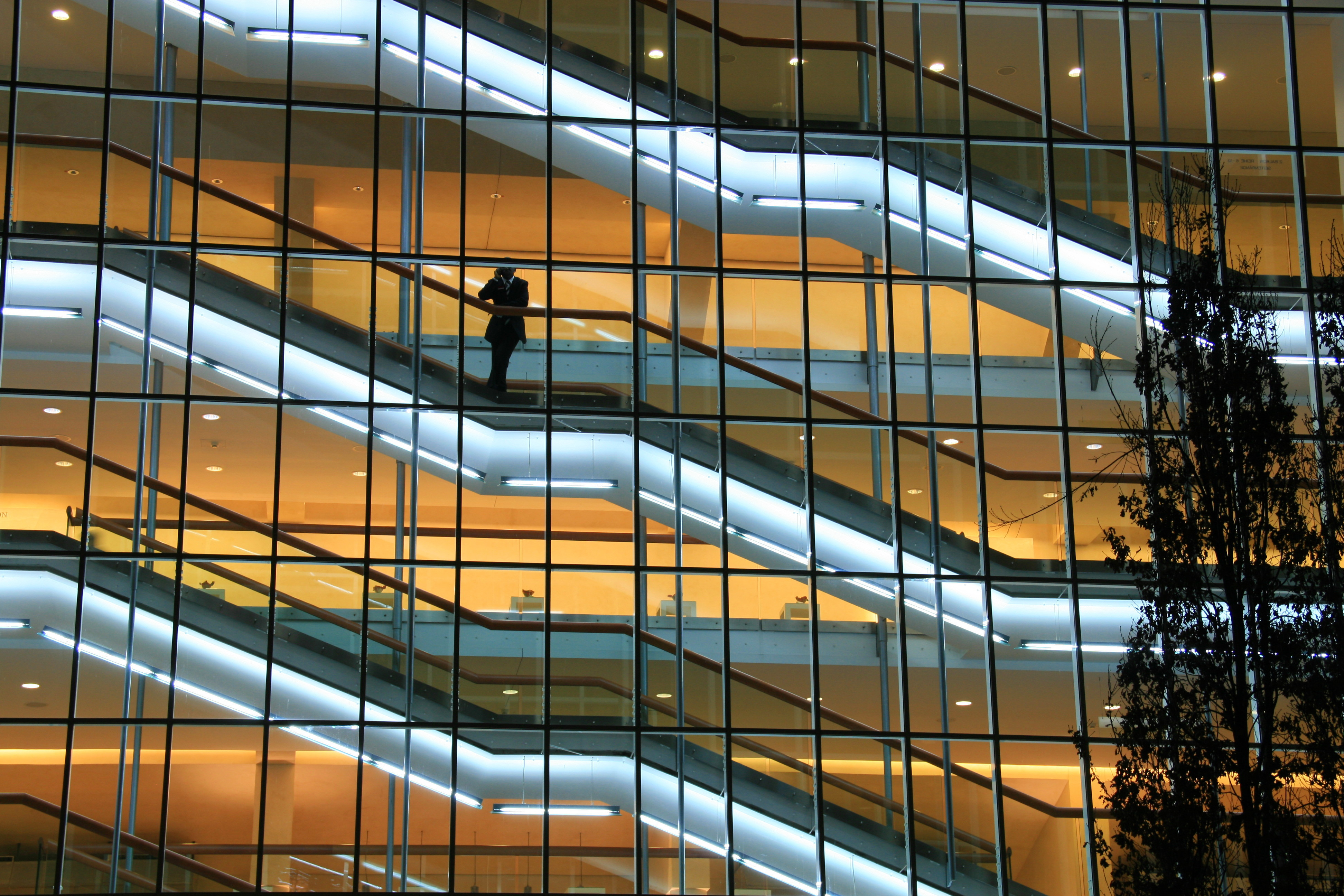 Treppenhaus zum großen Saal des Festspielhauses Baden-Baden